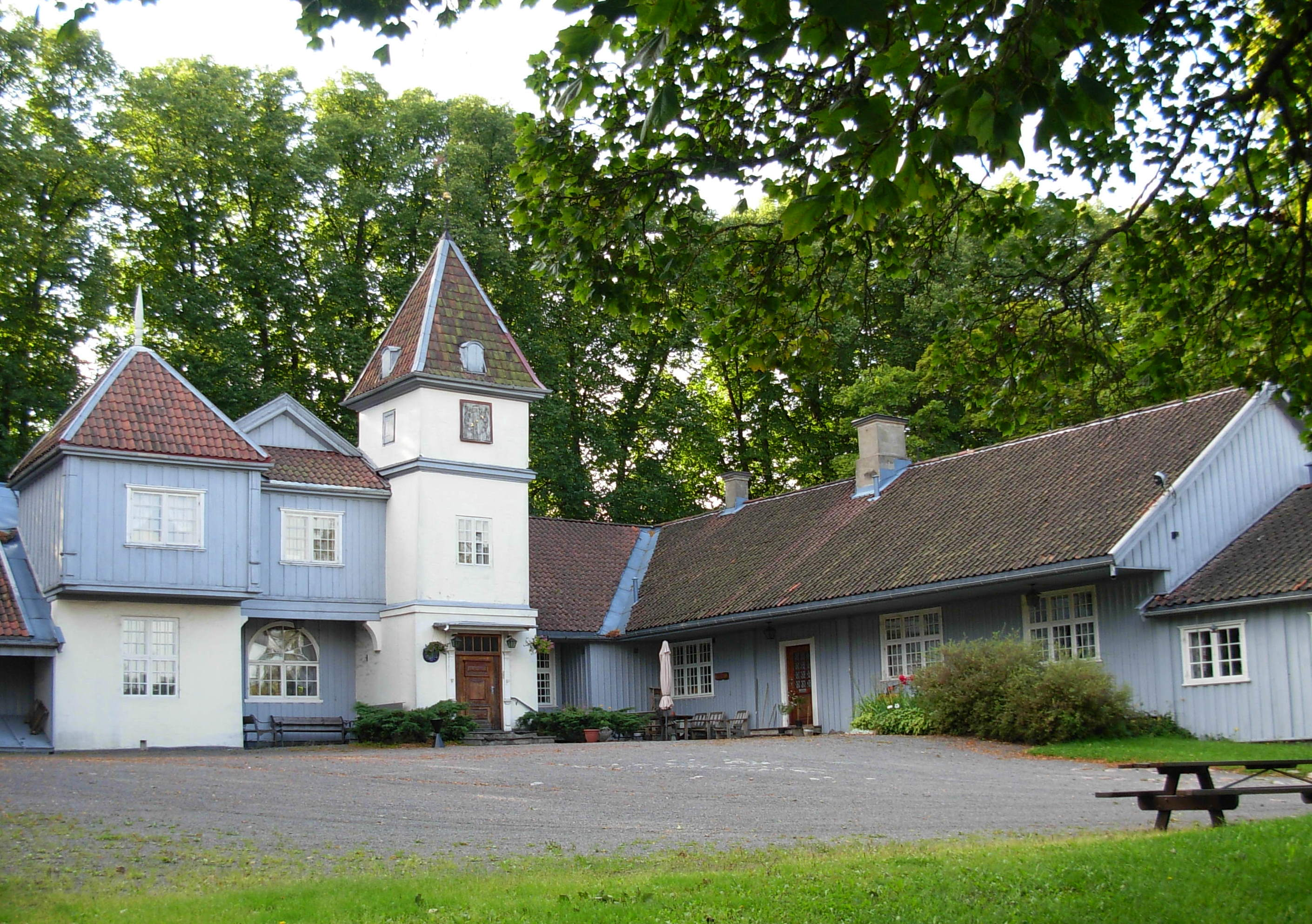 Nordre Skøyen hovedgård, Oslo